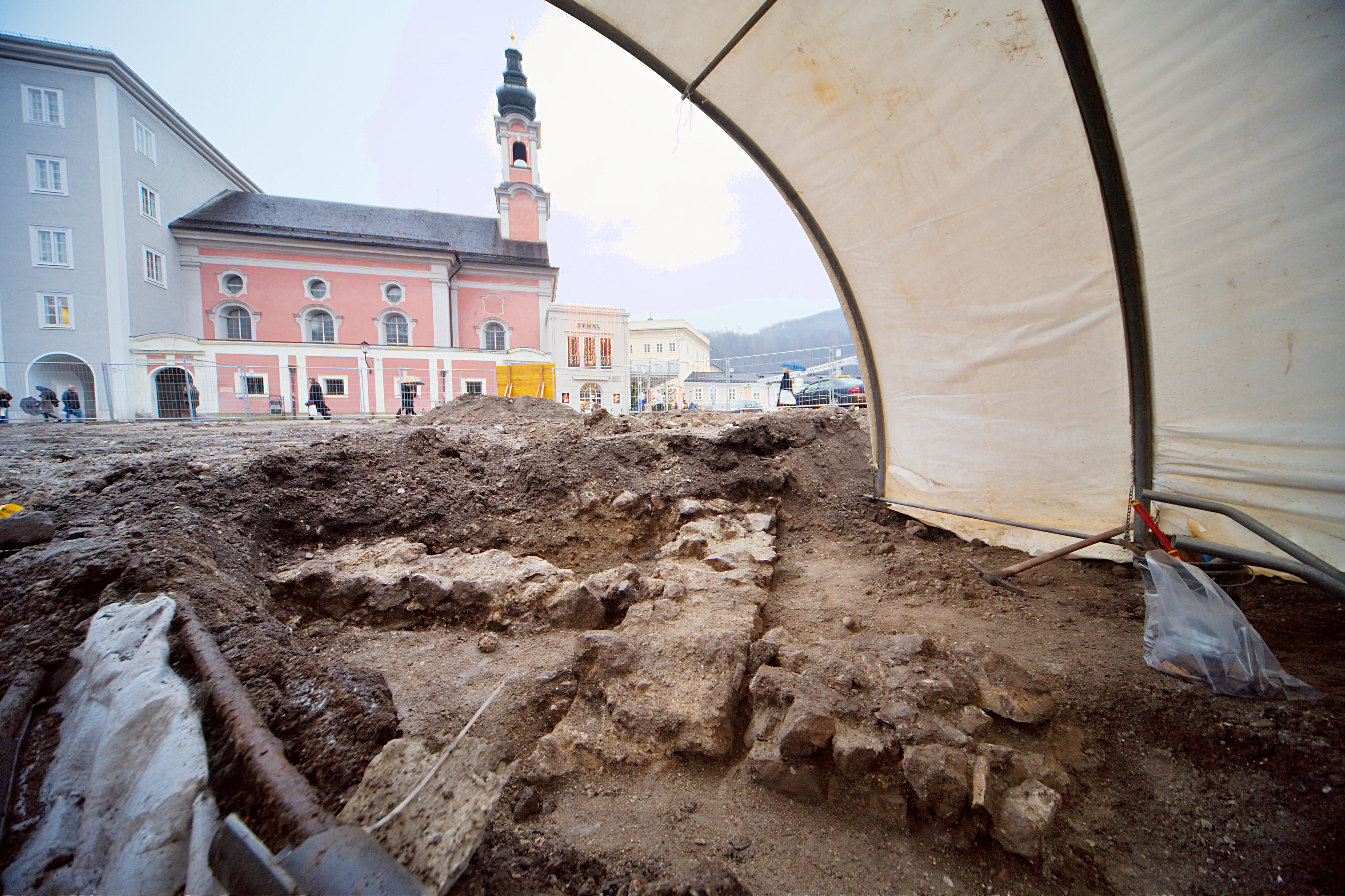 Römische Mauerreste unter dem Residenzplatz Salzburg. Die Freilegung geht ca. 1 m unter das heutige Platzniveau.